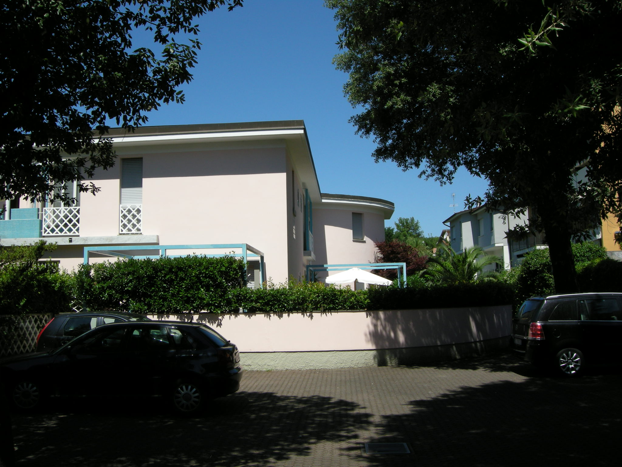 Condominio di viale roma 380 (Marina di Massa)